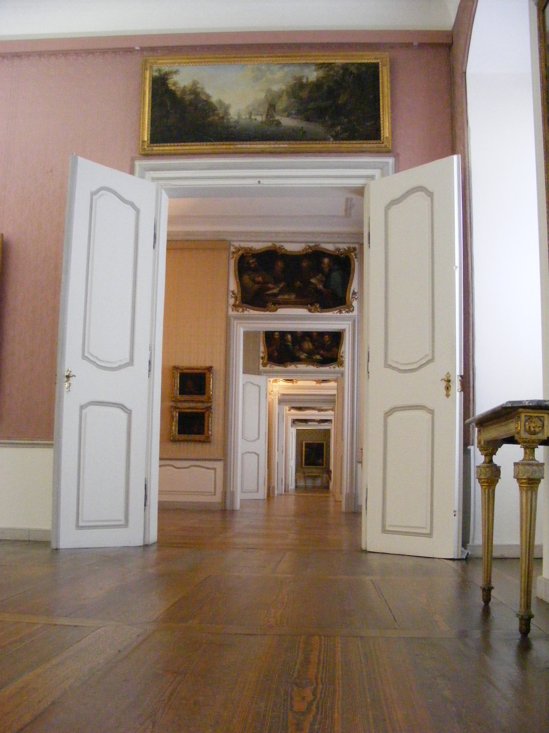 Residenzmuseum Bamberg/Staatsgalerie, Abt. Altdeutsche Malerei.